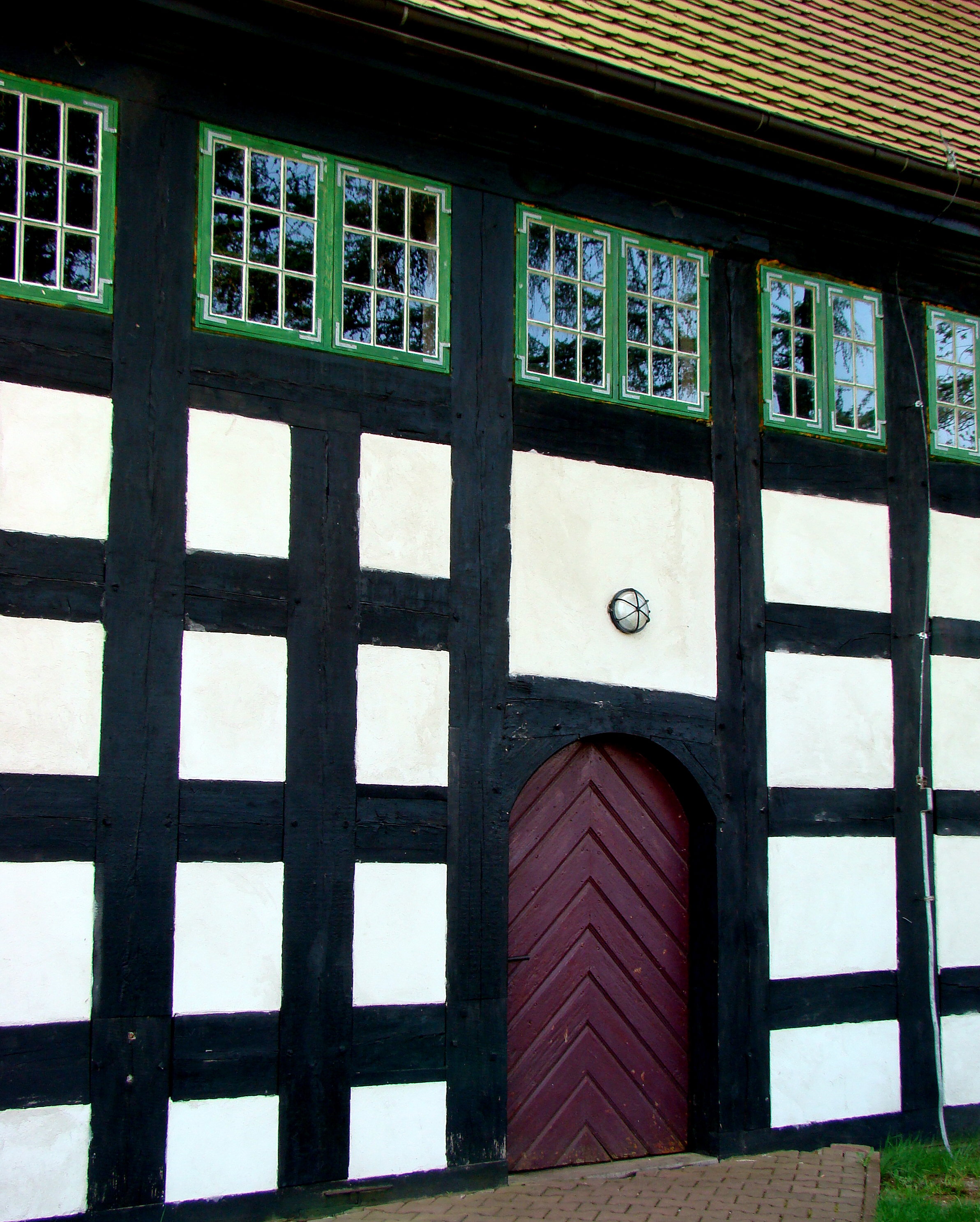 Kościół p.w. Św. Pawła w Tatyni, wejście, (Gmina Police, Powiat policki, Województwo zachodniopomorskie), Polska